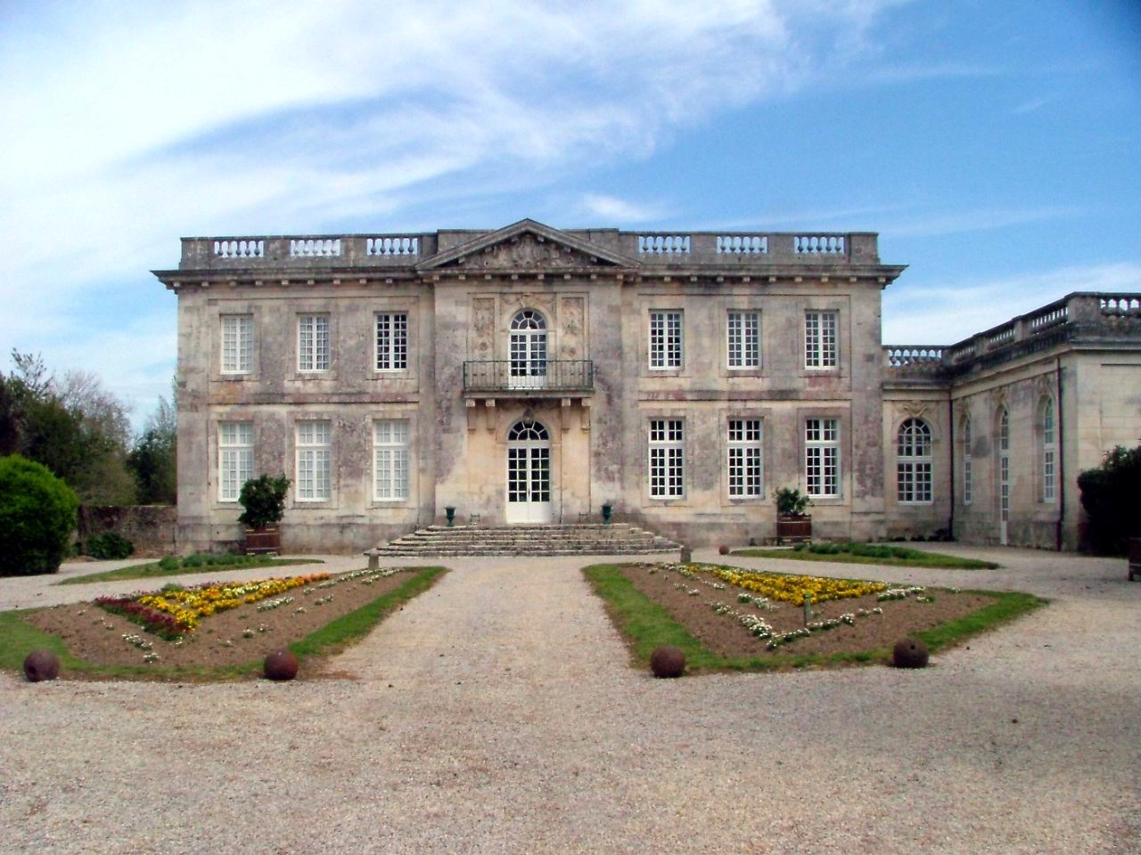 Photo du château de Pierre Levée à l'Ile d'Olonne, construit peu avant la Révolution.